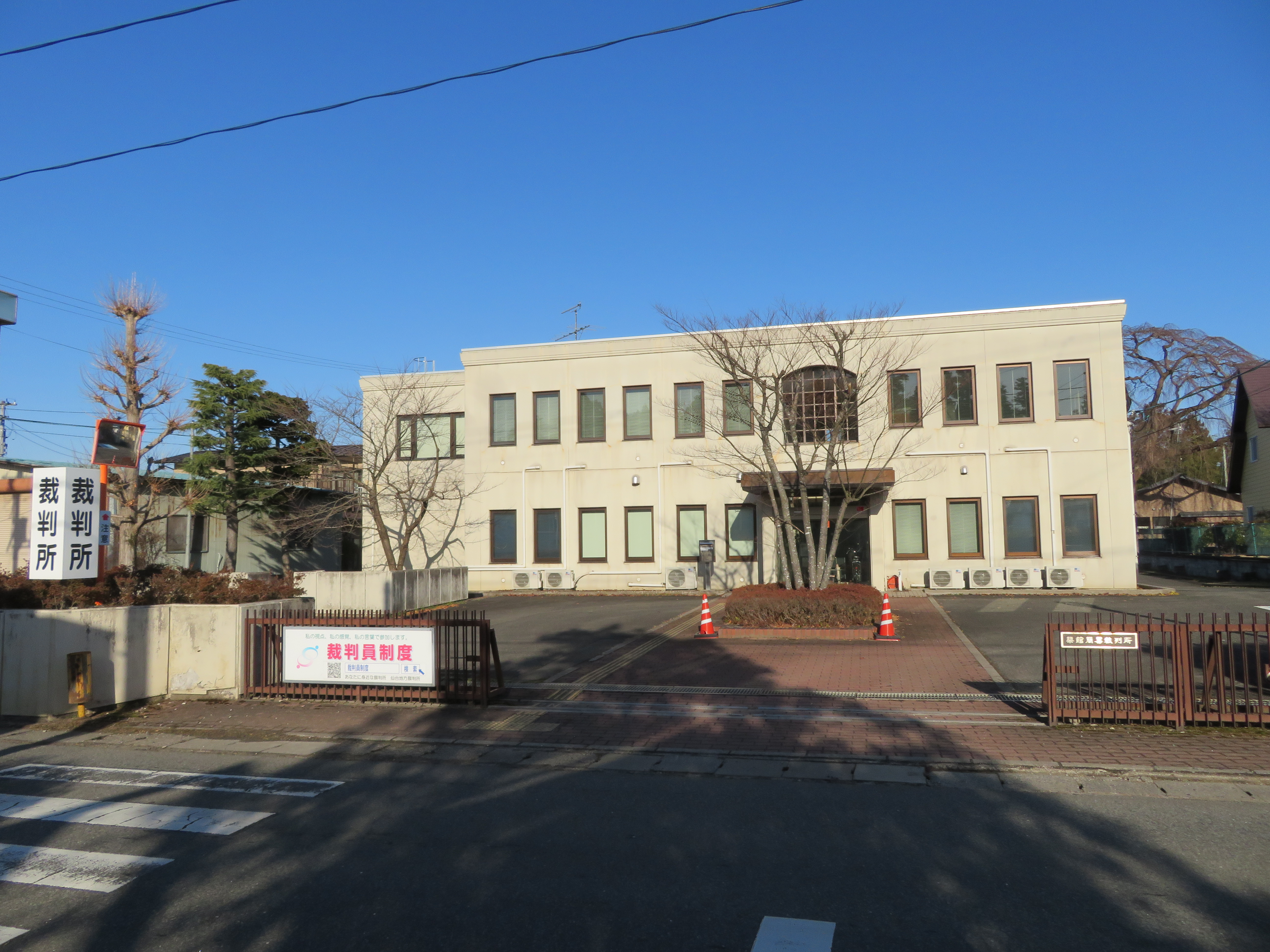 宮城県栗原市に所在する築館簡易裁判所 Canon PowerShot SX720 HS